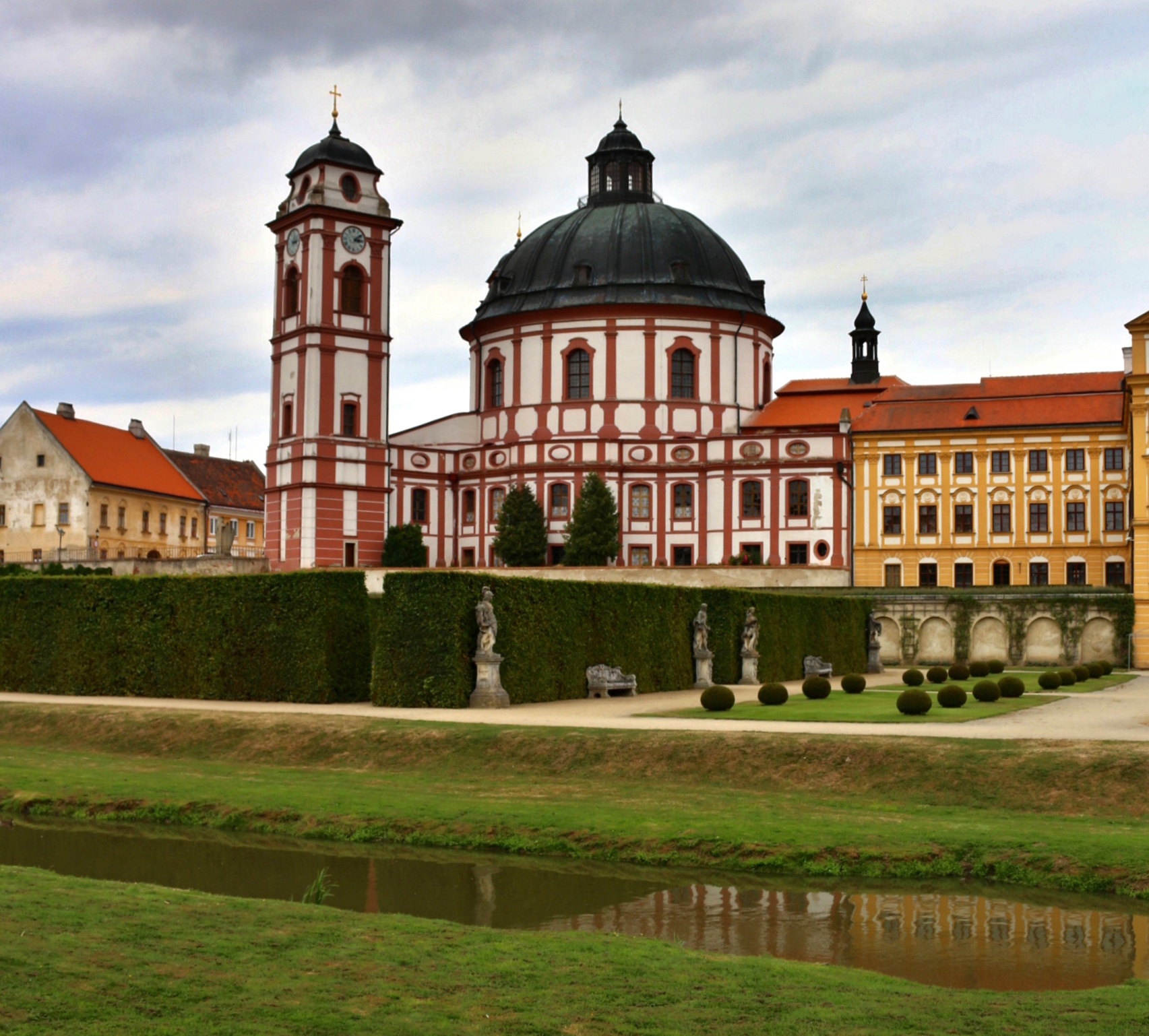 Jaroměřice nad Rokytnou, kostel sv. Markéty